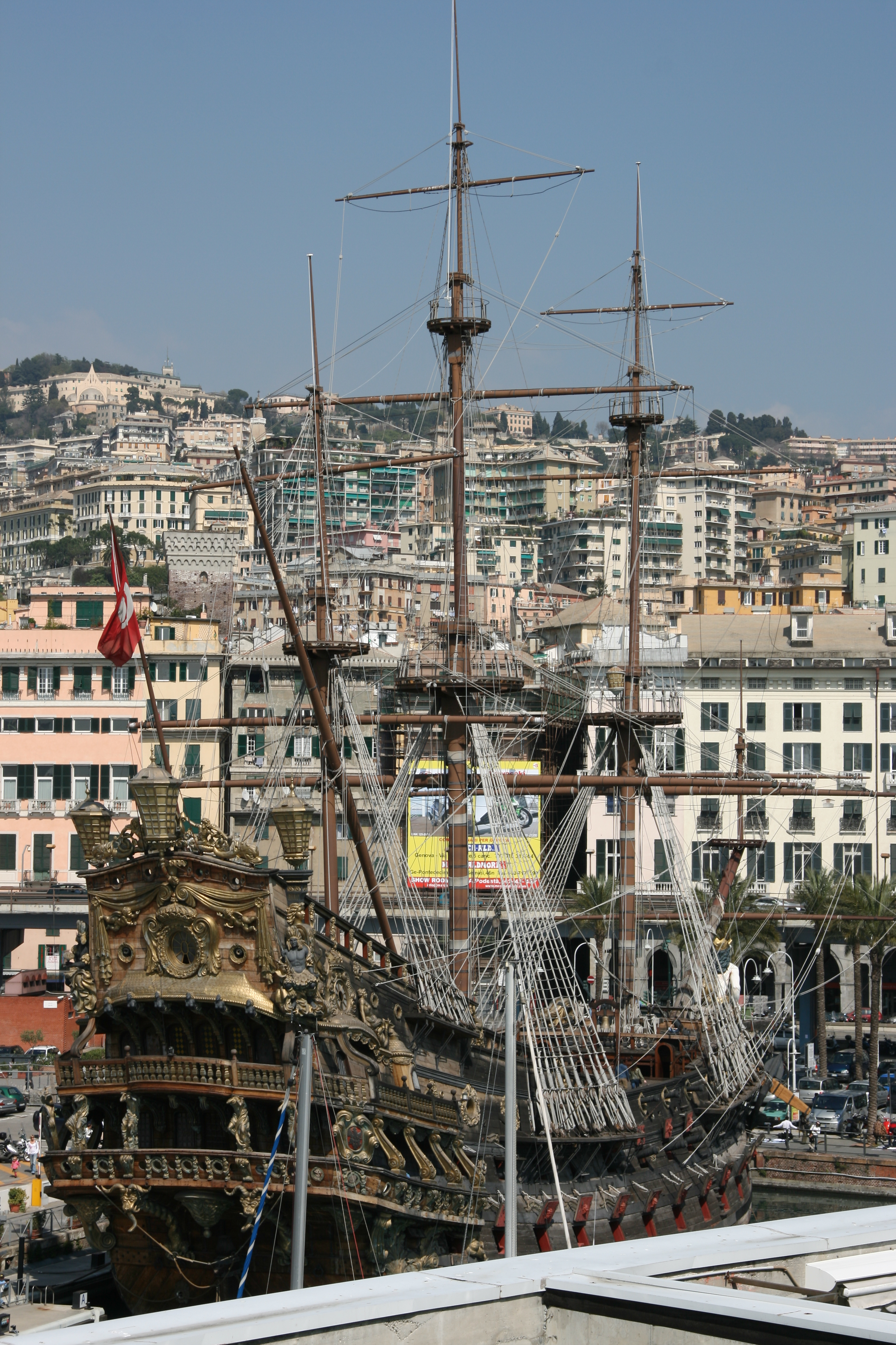 La riproduzione di un antico veliero nel porto vecchio di Genova